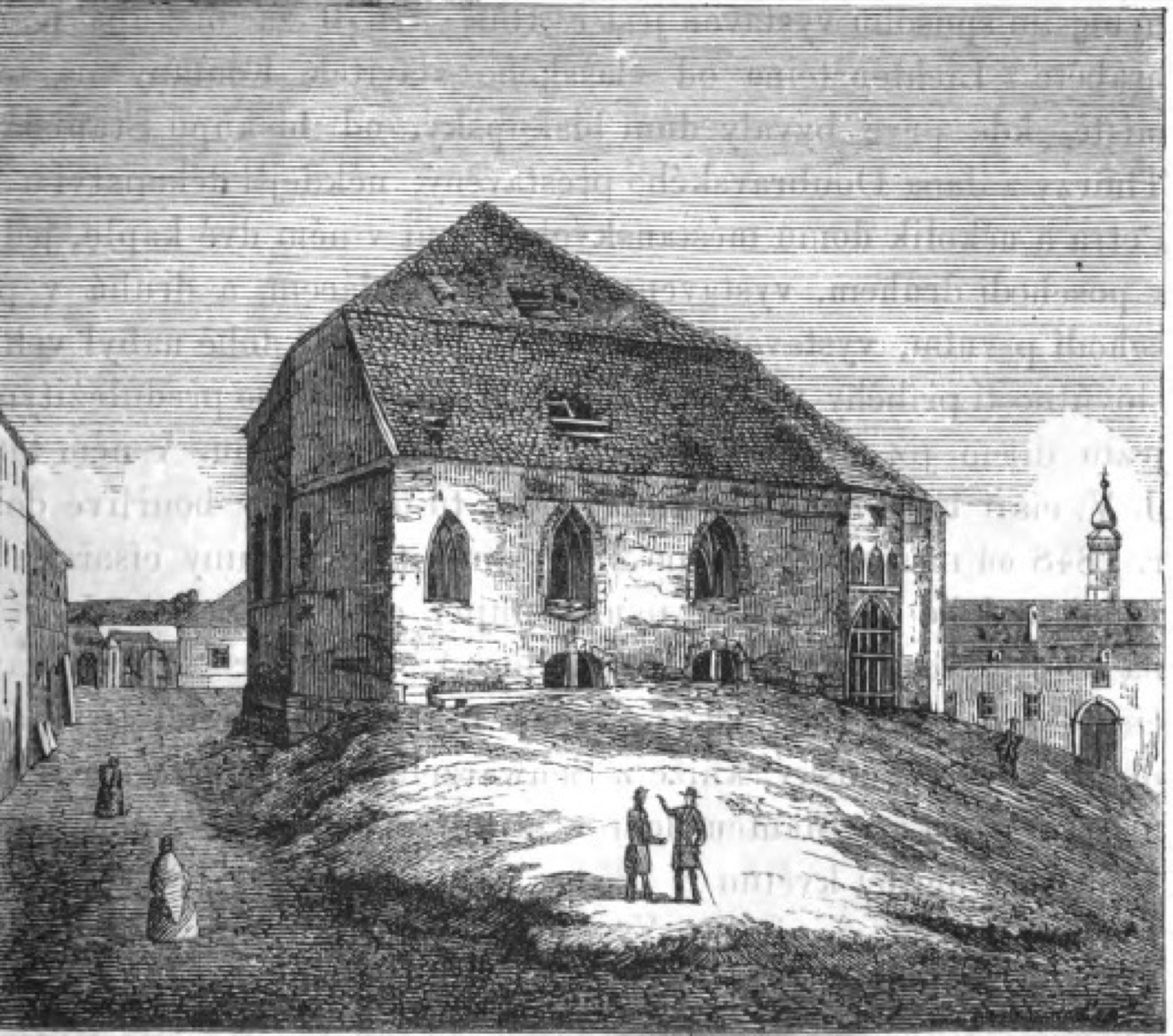 kresba kostela sv. Blažeje v Olomouci